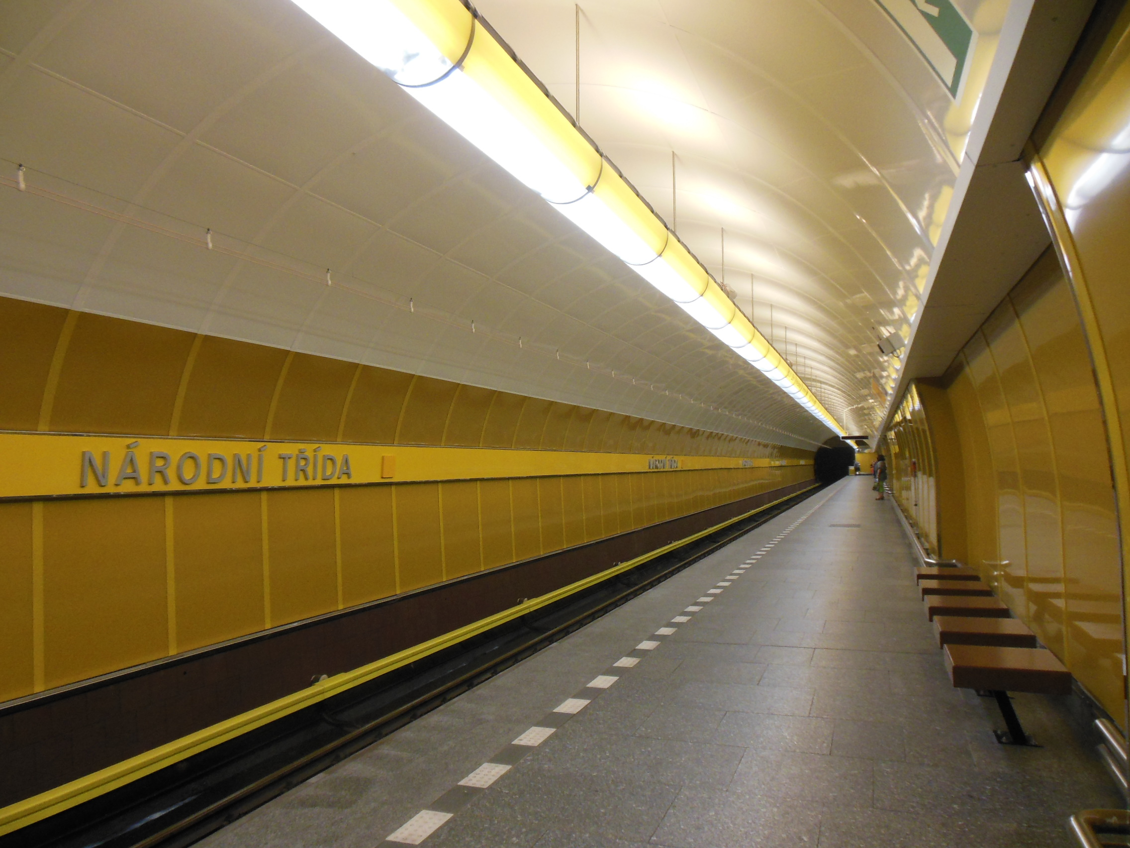 Praha-Nové Město. Stanice metra B Národní třída, stav po rekonstrukci 2012-2014.